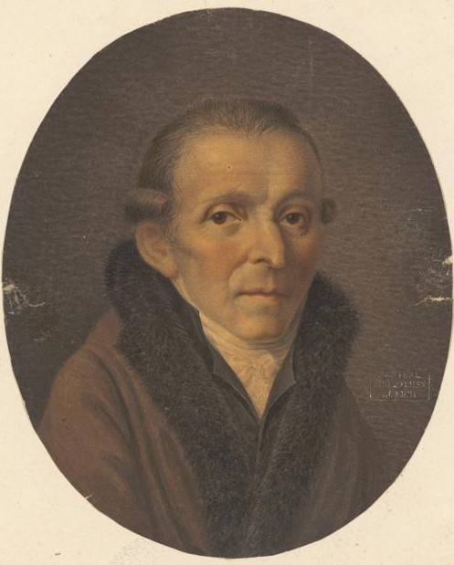 Porträt von Johann Jakob Hess, um 1800. Gouache ; Bild oval 12,7 x 10,7 cm. Zentralbibliothek Zürich, Hess, Joh. Jakob (a) I, 19 Pp A5.